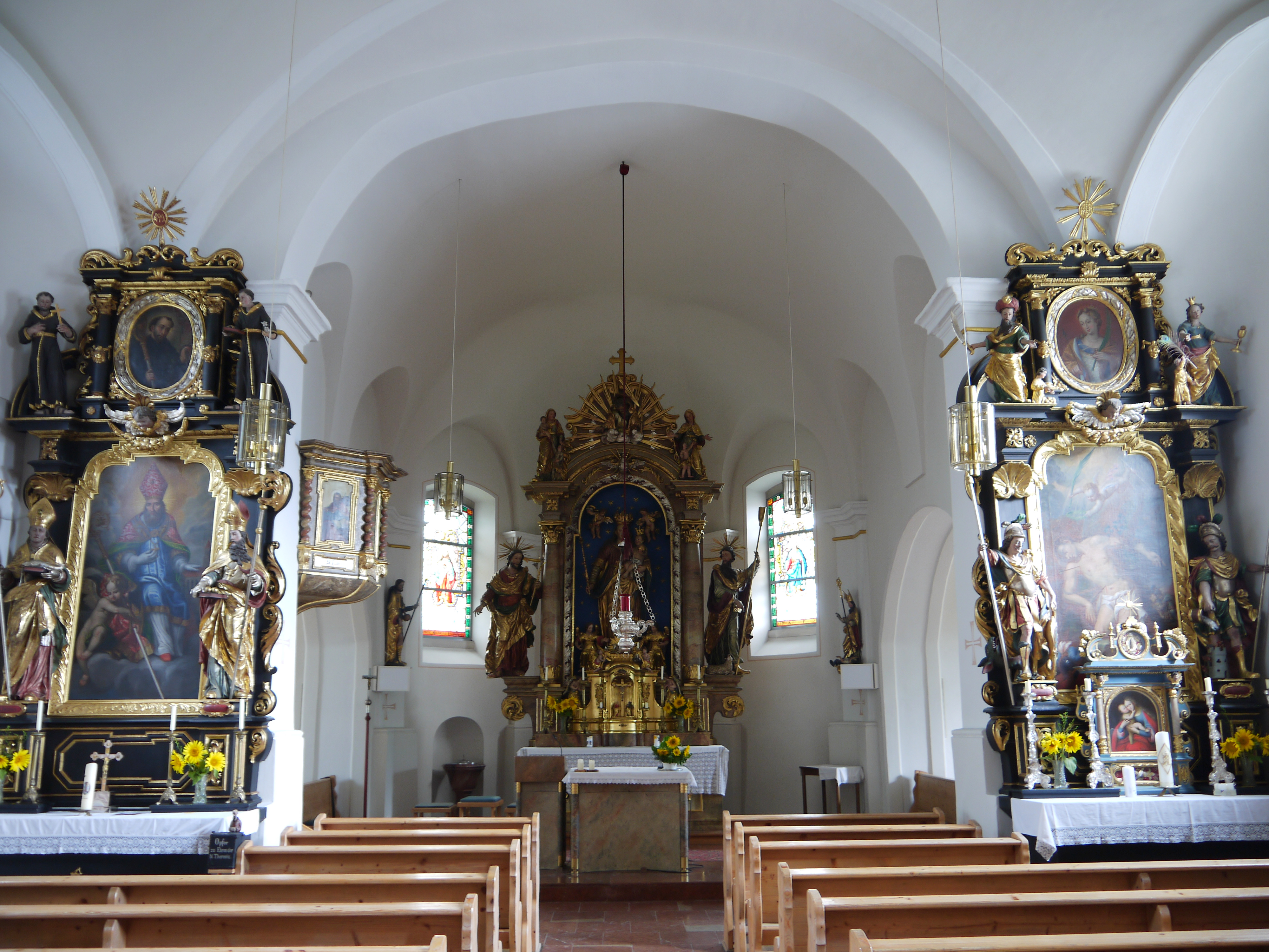 Kath. Pfarrkirche Mariae Heimsuchung